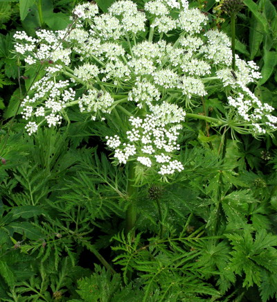 Цветущее растение реброплодника уральского. Красноярский край, Западный Саян, парк "Ергаки".